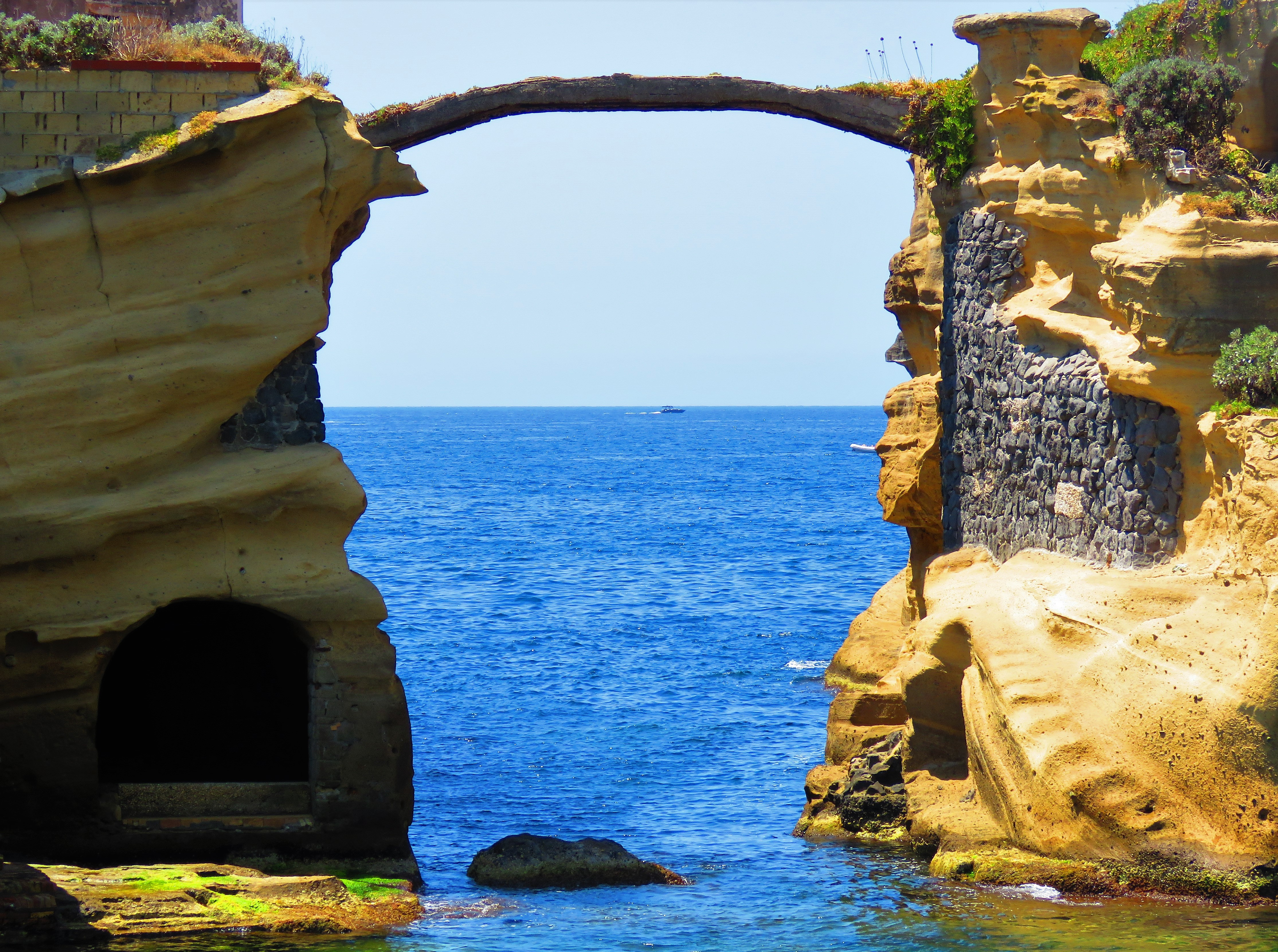 La Gaiola, il ponte.